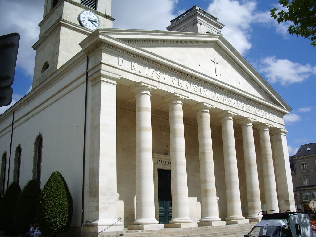 L'Église Saint-Louis de La Roche-sur-Yon.